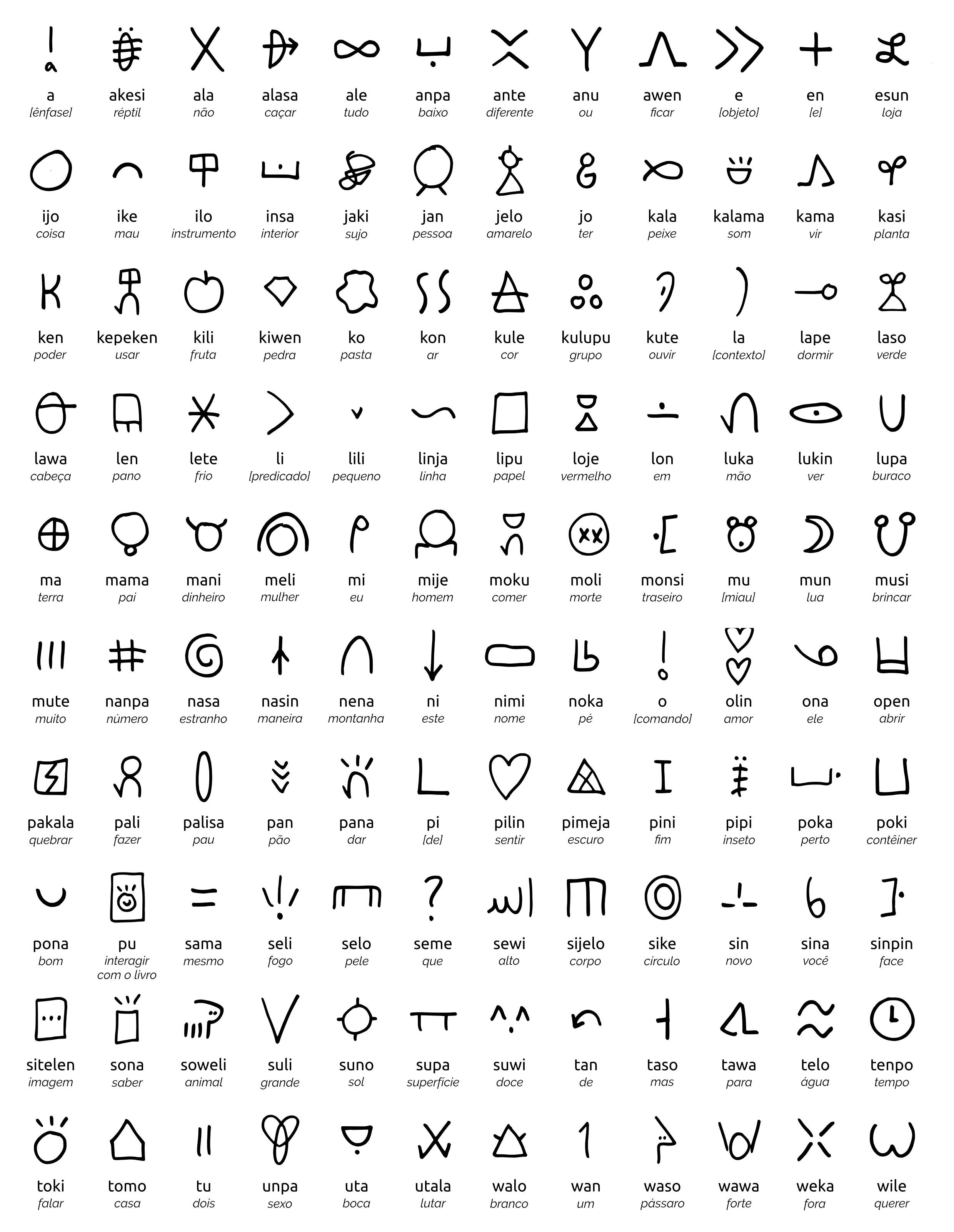 um sistema de escrita para toki pona de Sonja Lang com definições em português